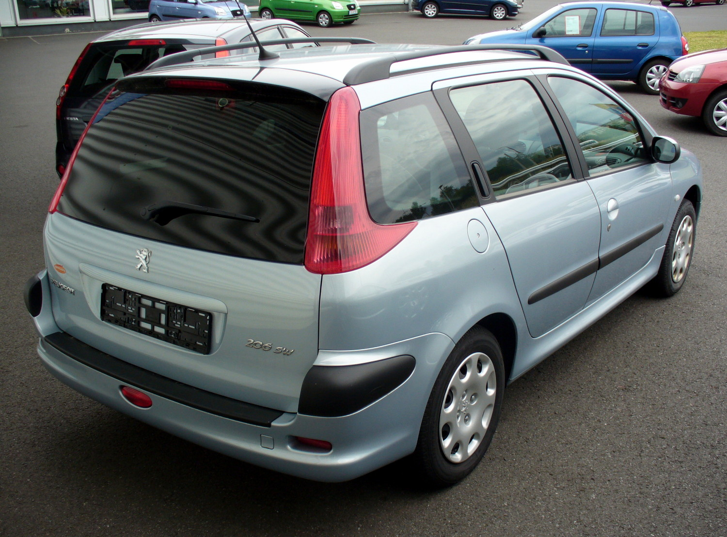 Peugeot 206 SW